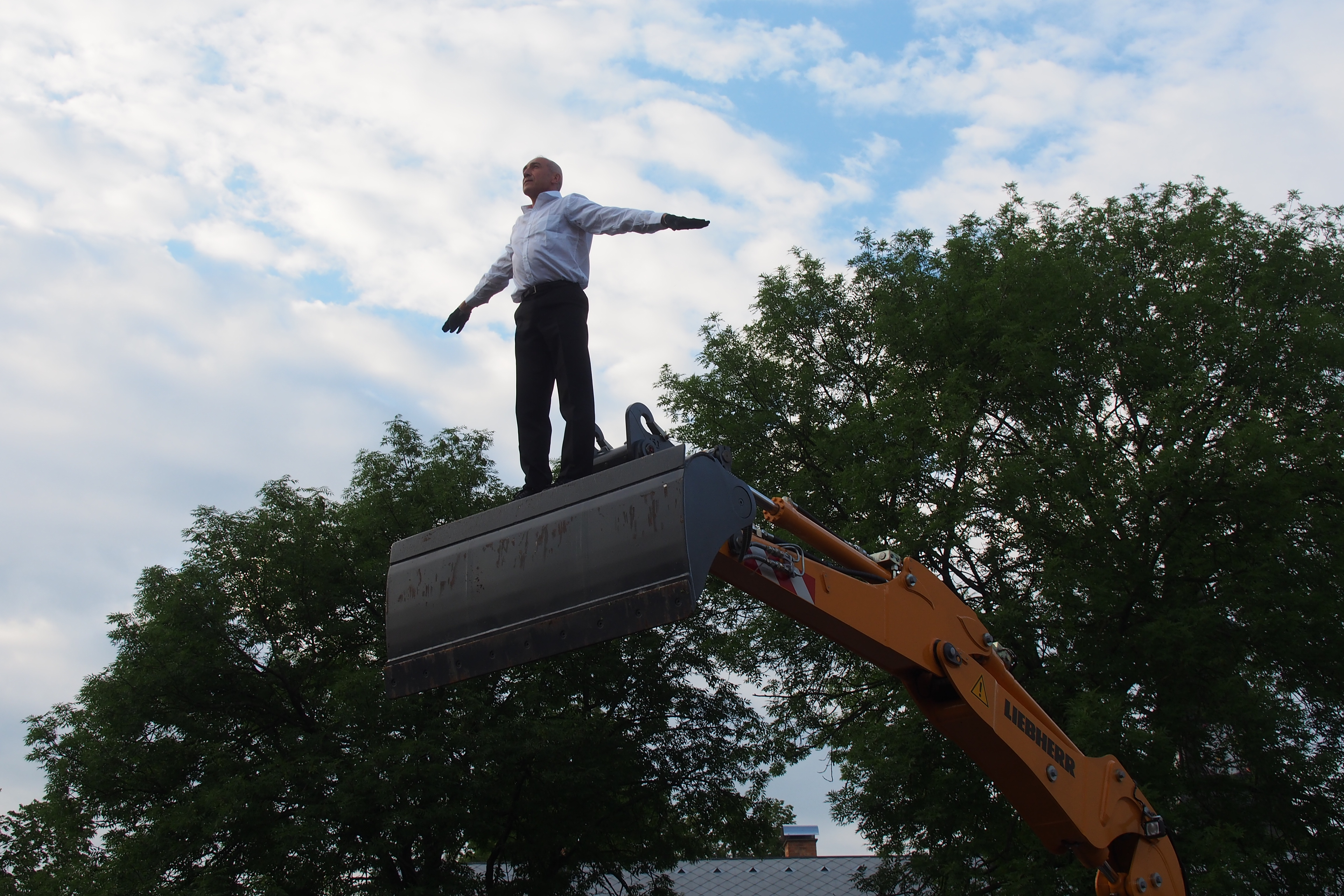 Festival současného tance, pohybového divadla a nového cirkusu KoresponDance 2013, performance Dominiqua Boivina Něžný bagr.